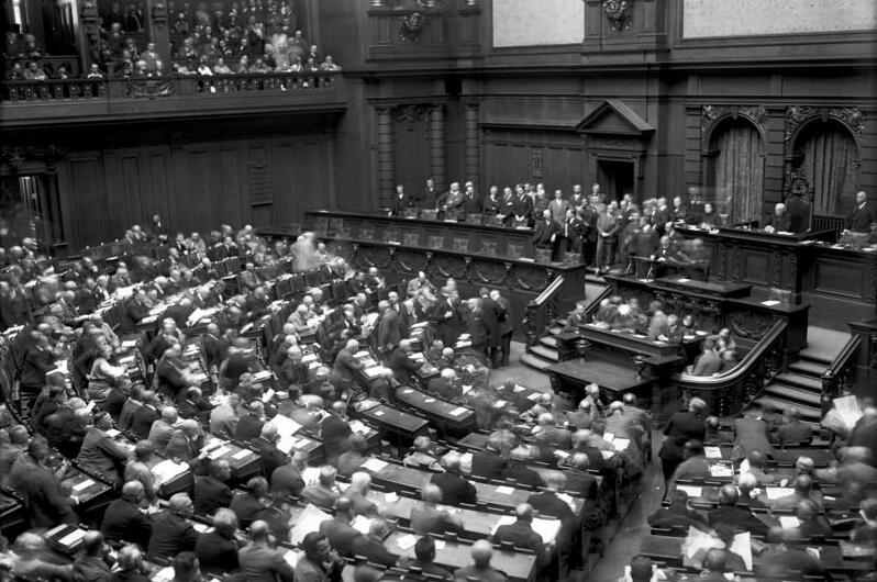 Die Eröffnungssitzung des neuen Reichstages! Blick in den Plenarsitzungssaal des Reichstages, kurz nach der Eröffnung. Im Präsidentenstuhl der älteste Abgeordnete des Reichstages, der Sozialdemokrat Bock, welcher der Eröffnungssitzung präsidierte.